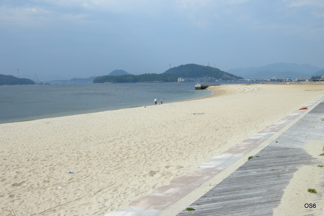 広島県坂町ベイサイドビーチ坂